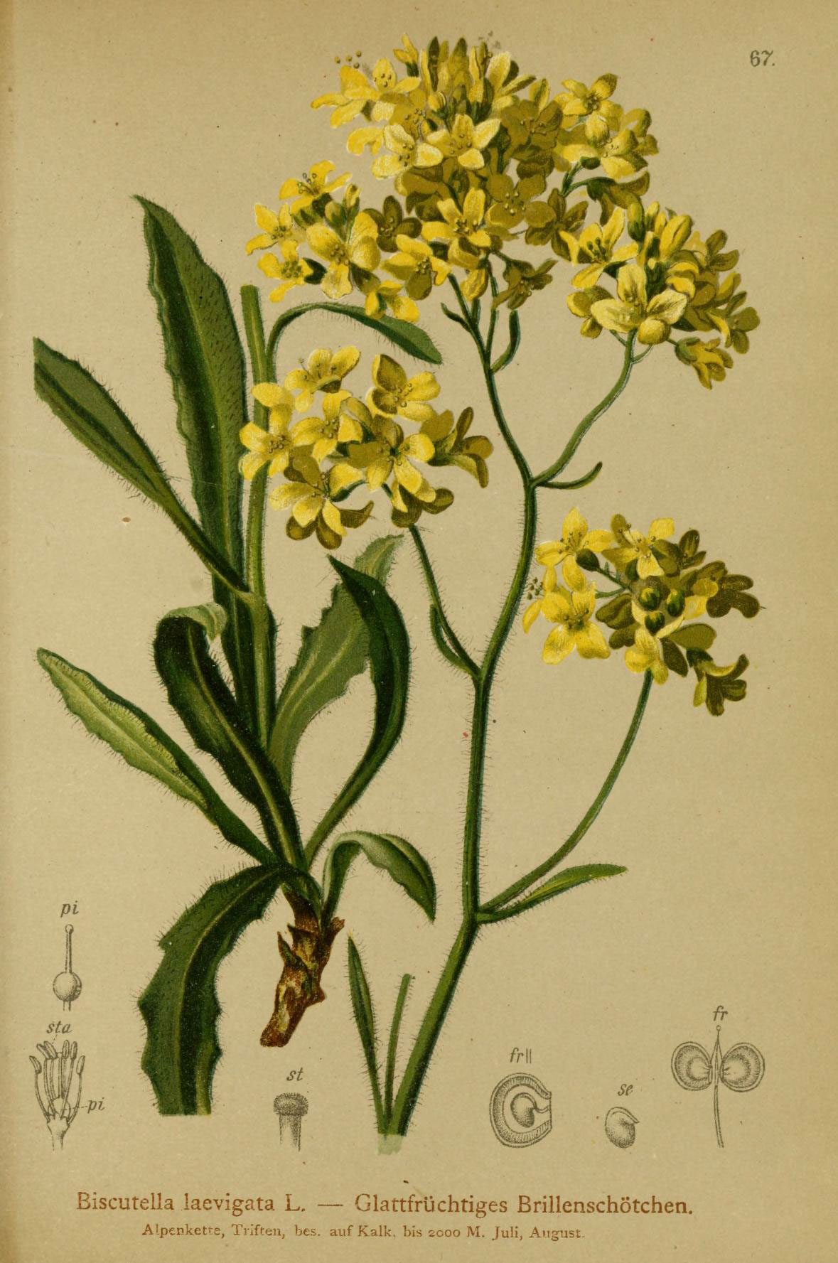 Biscutella laevigata L. — Glattfrüchtiges ßrillenschötchen. A'.penkette, Triften, bes. auf Kalk, bis sooo M. Juli, August